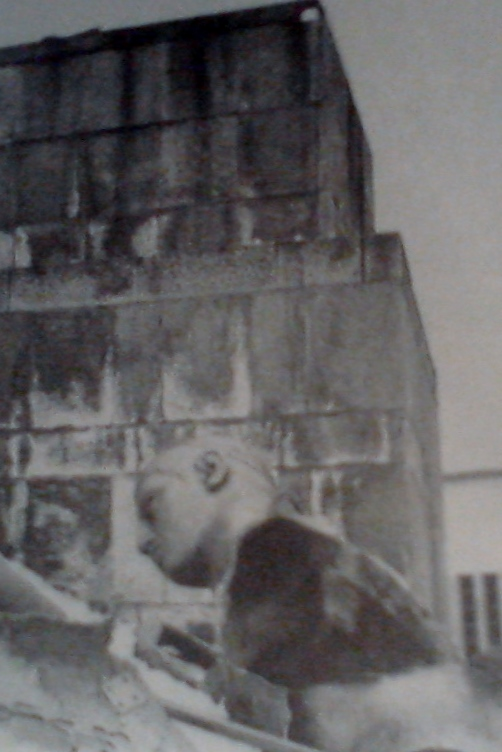 Esplosione del monumento al genio del fascismo (gennaio 1962)